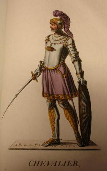 Recueil de tous les costumes des ordres religieux et militaires. avec un abrégé historique et chronologique, enrichi de notes et de planches coloriées